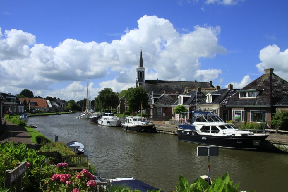 Burdaard, dorp aan de Dokkumer Ee in de genemeent Ferwerderadiel in Fryslân. Burdaard heeft een beschermd dorpsgezicht. Als we de foto bekijken kunnen we dat best begrijpen.Ook is het een gezellig dorp en dit is dan vooral te danken aan de vele plezierjachten die daar even of voor iets langer aanleggen. Ook al heb je geen boot, u kunt er voor een nachtje wel terecht. Het bordje op de foto met Béd en Brochje nodigt u van harte uit. Burdaard is gelegen op beide oevers van de Dokkumer Ee in de Gem.Ferwerderadiel in Fryslân.